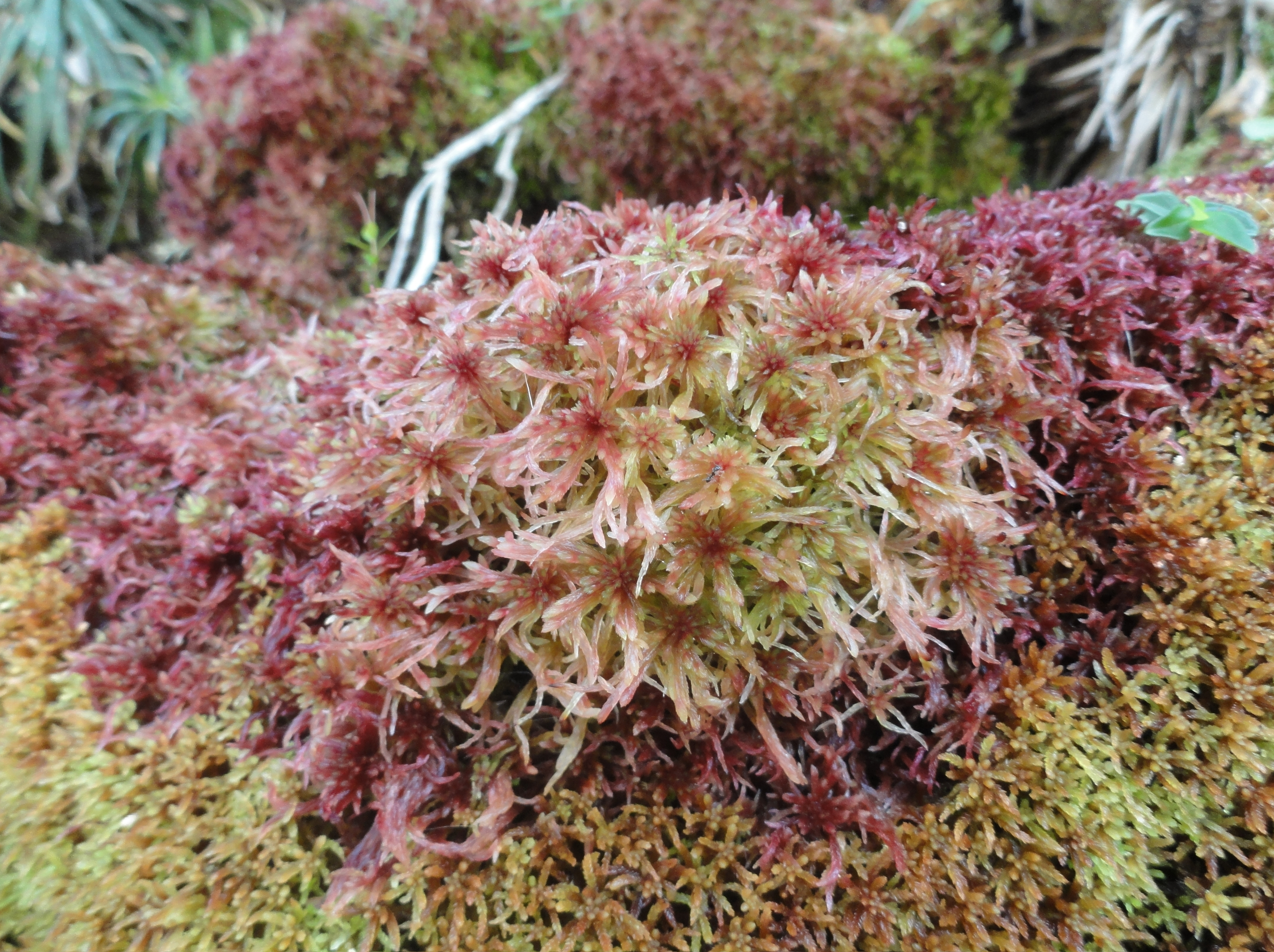 Musgo do gênero Sphagnum (Sphagnum russowii) cobre formação rochosa em rio - Chapada Diamantina BA, (2011)